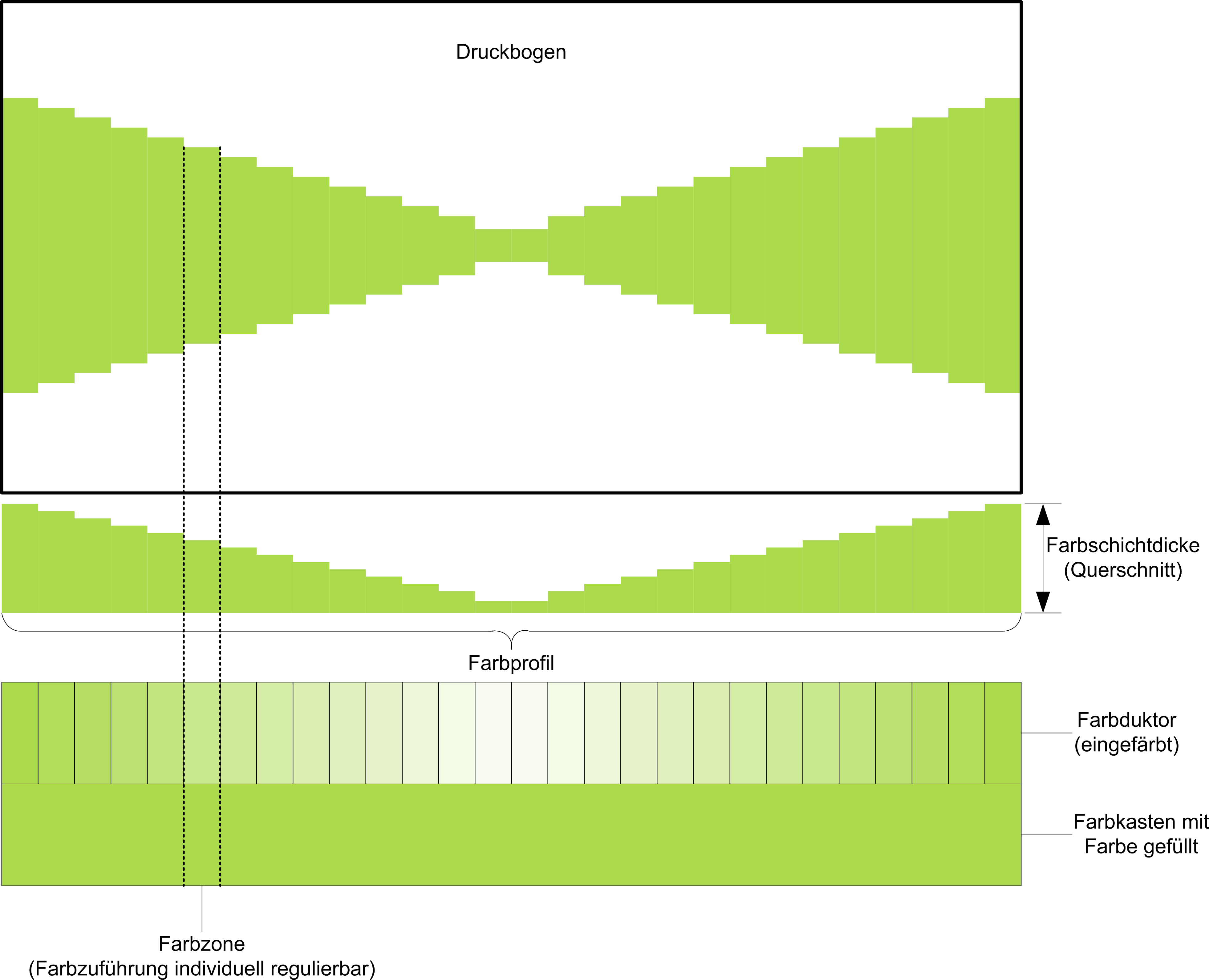 Die Abbildung zeigt das Schema der zonalen Farbzufuhr bei Bogenoffsetdruckmaschinen.